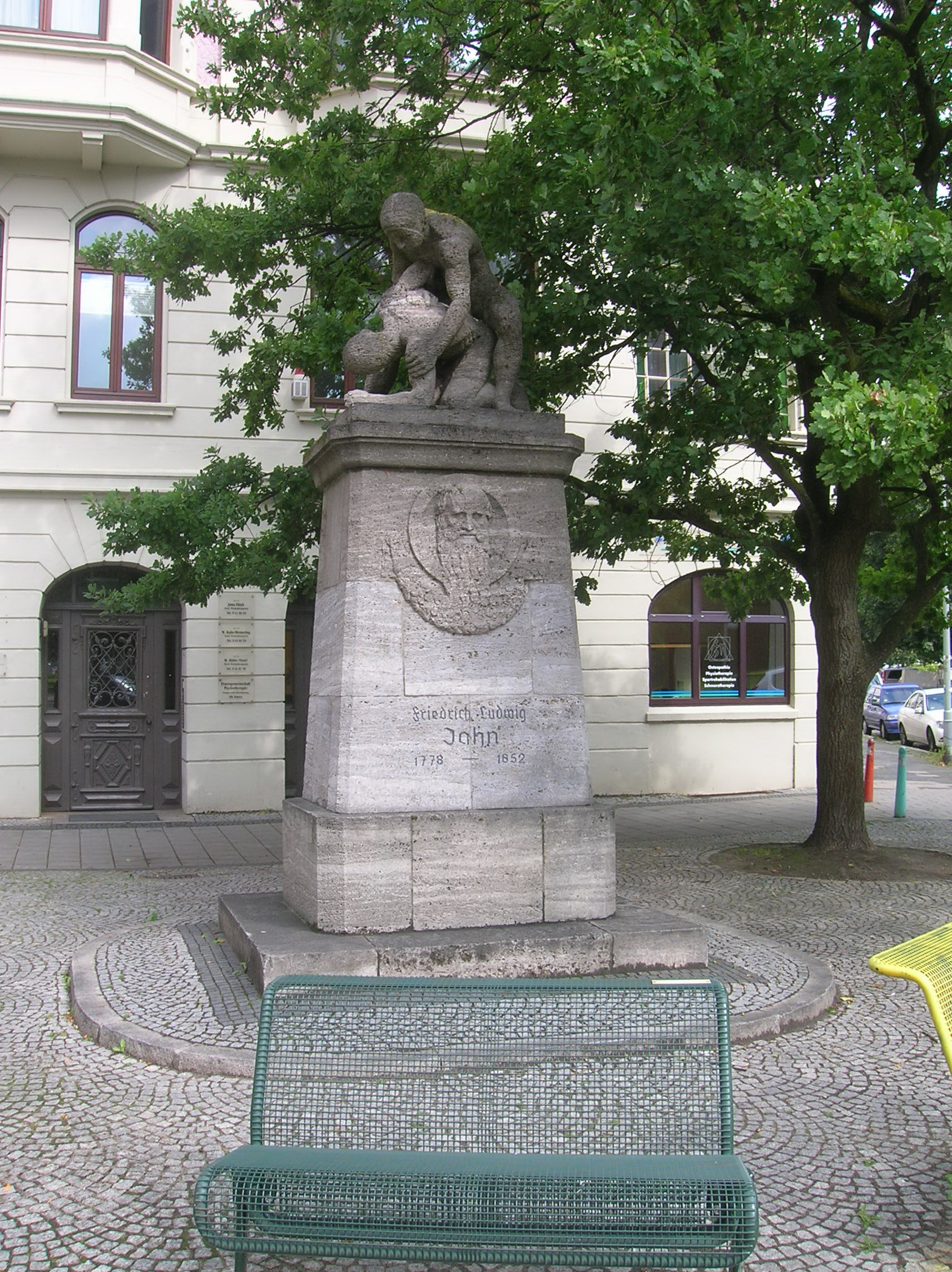 Denkmal für Friedrich Ludwig Jahn in Bremerhaven.